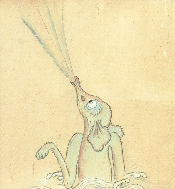 Shiofuki (Yōkai) from the Bakemono-tsukishi-emaki (化け物尽くし絵巻)